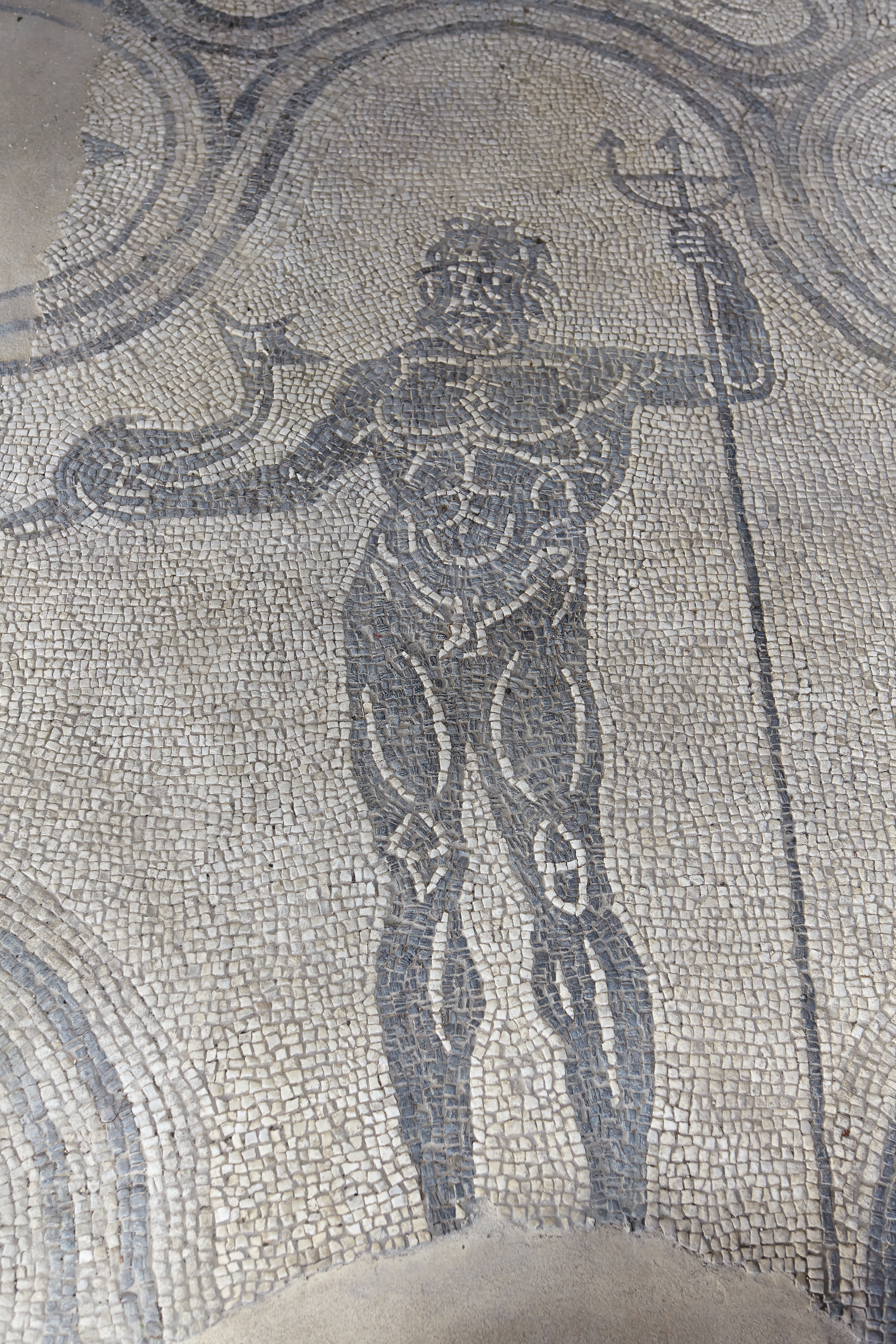 Terme di Vasto This is a photo of a monument which is part of cultural heritage of Italy.